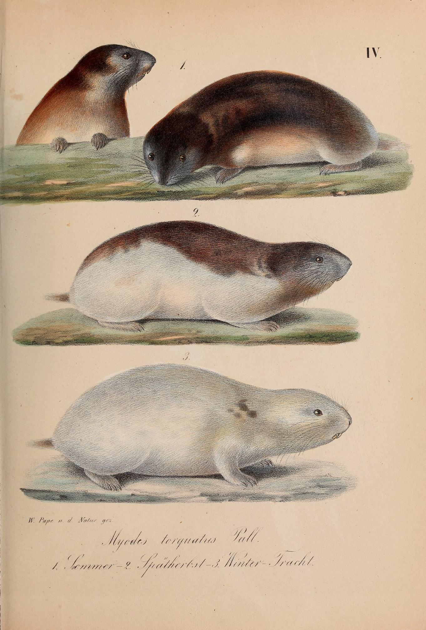 IV —.-^^T; v-r "^,' h-5^/s»'Ä't7'^' -^-;^: =: " .'^^J?^i^s^'-^'^~ -^ ,v.«^^ .^, /■/' /V//»^ // !^ .l?/////- .^^' i/rr/f'j /r/7///^y/// / . 4/v/////^/' -t .y//^^///r/ 7/ ^ '/V////